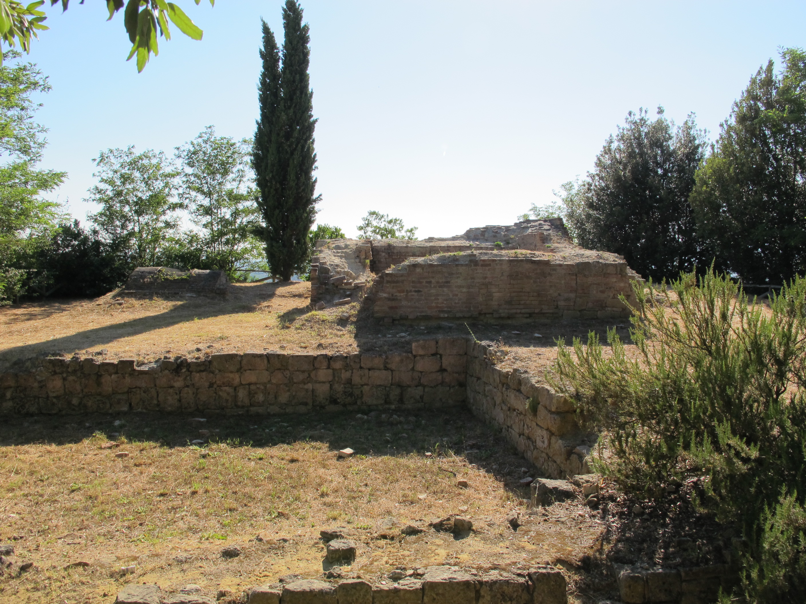 Montopoli v.a., cassero